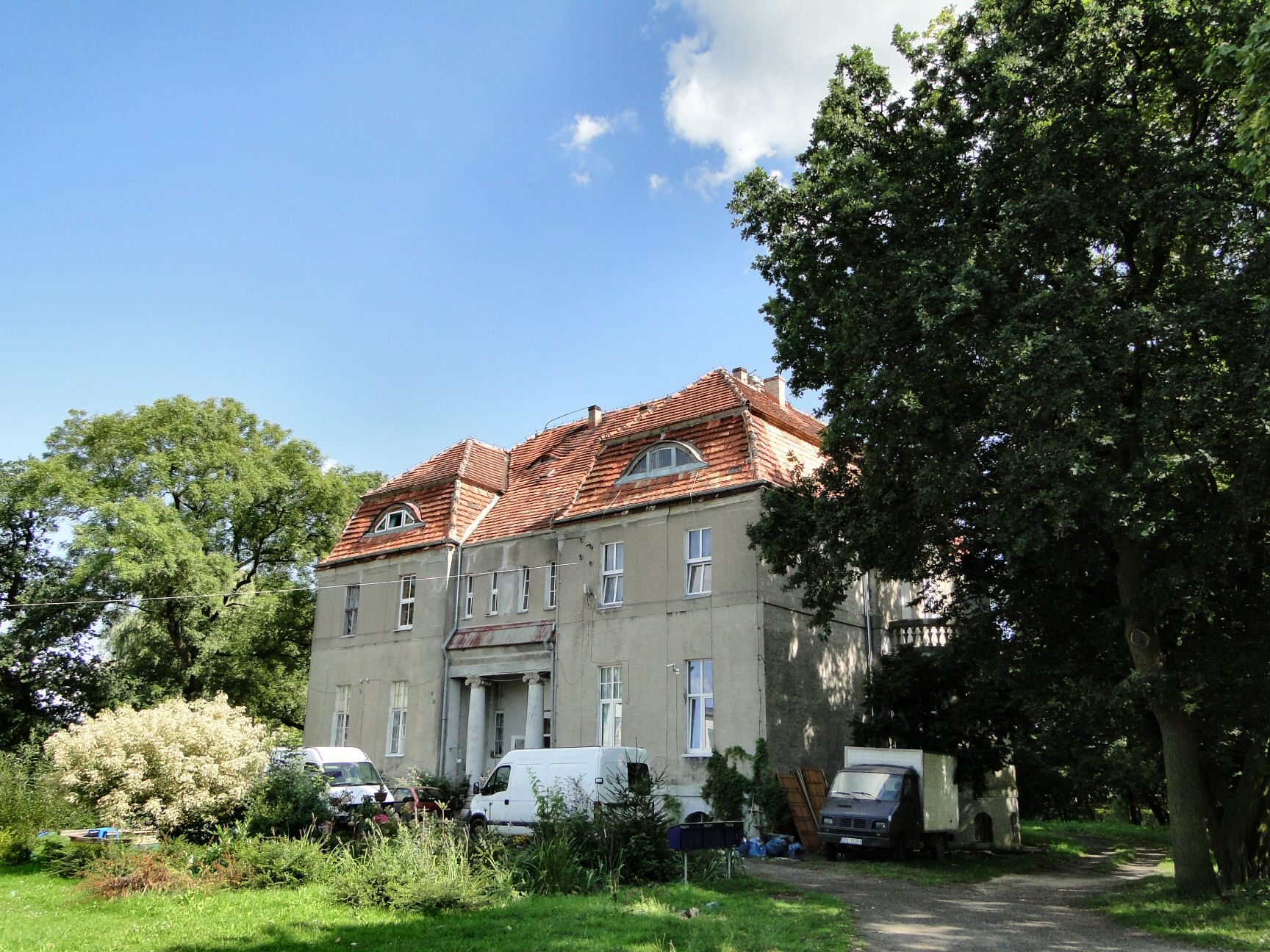 Dwór z pocz. XX w. w Rajkowie 01.2005.